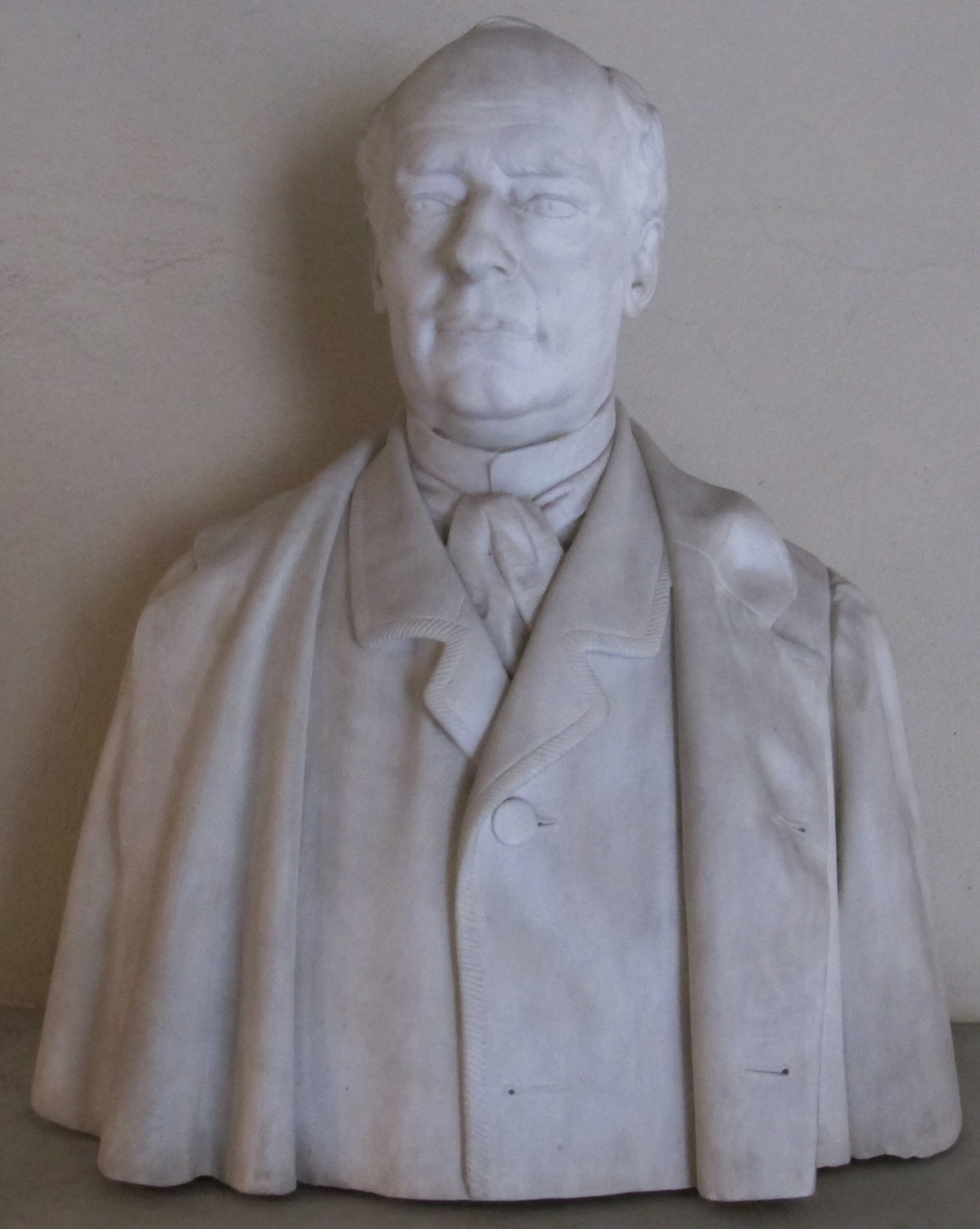 S. croce, lapidarium, pagnucci, busto di carlo poerio, 1867-68